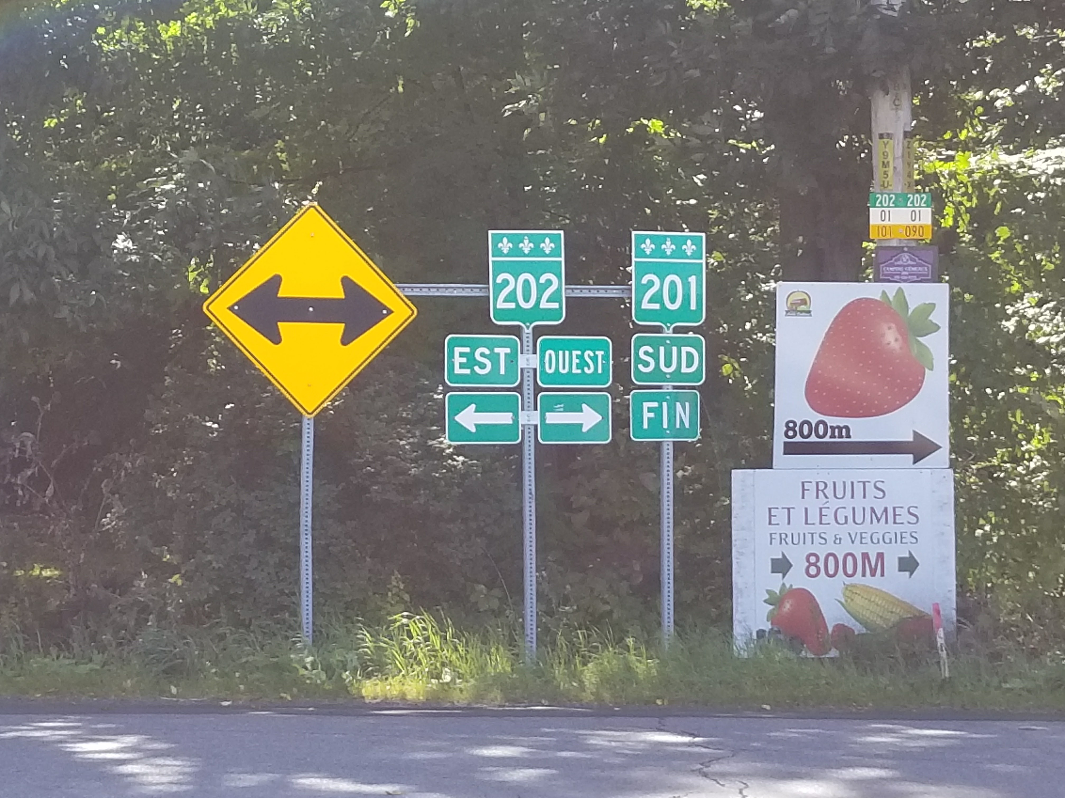 Extrémité sud de la Route 201, à la Route 202, près de Franklin, Québec.